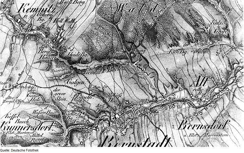 Original image description from the Deutsche Fotothek Bernstadt auf dem Eigen. Franzosenmühle oder "Woll Spinnerei", Ausschnitt aus: Oberreit, Sect. Zittau, 1844/46